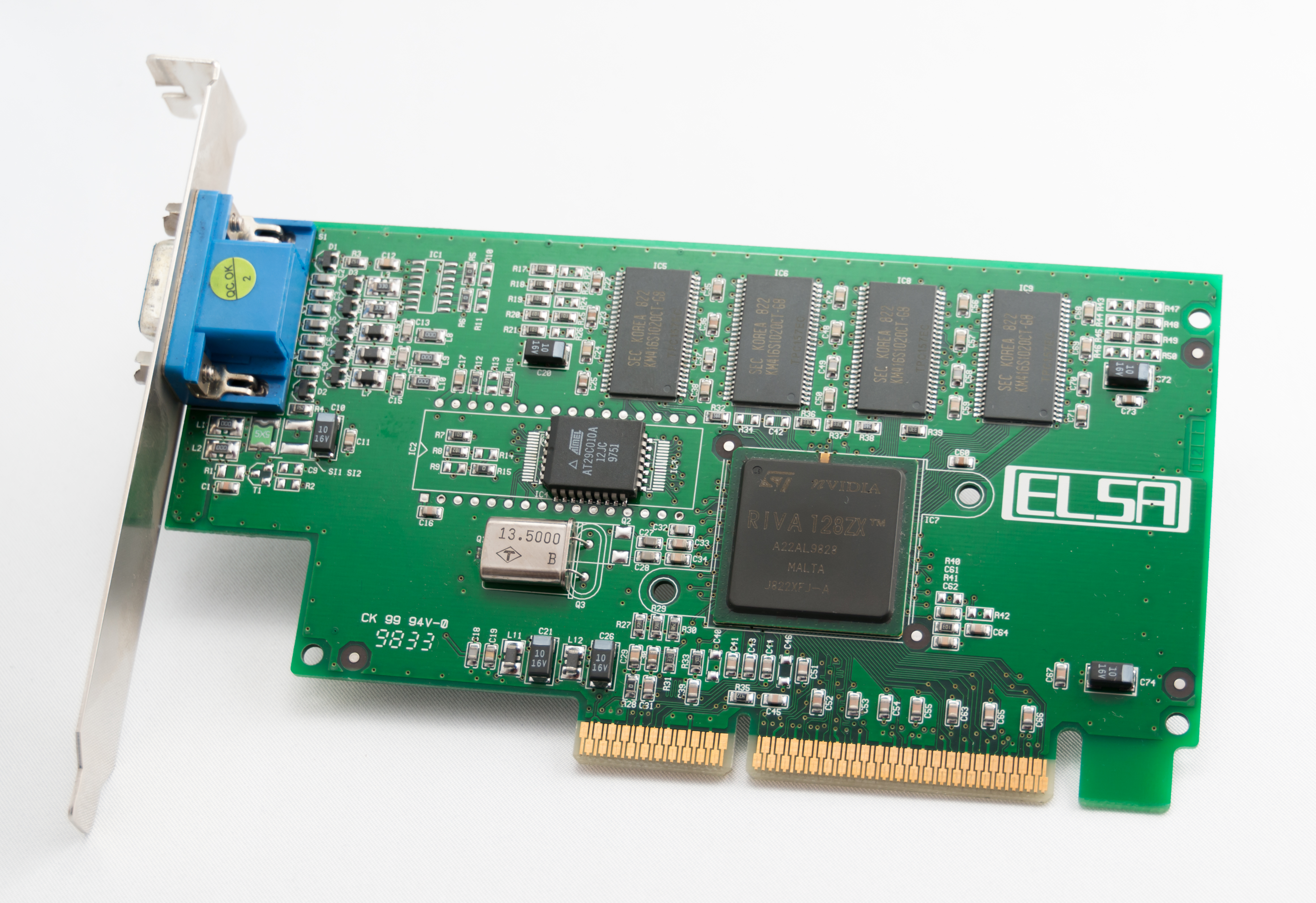 NVIDIA@350nm@Fixed-pipeline@NV3_ZX@Riva_128ZX@A22AL9828_MALTA_J822XFJ-A___DSC02404